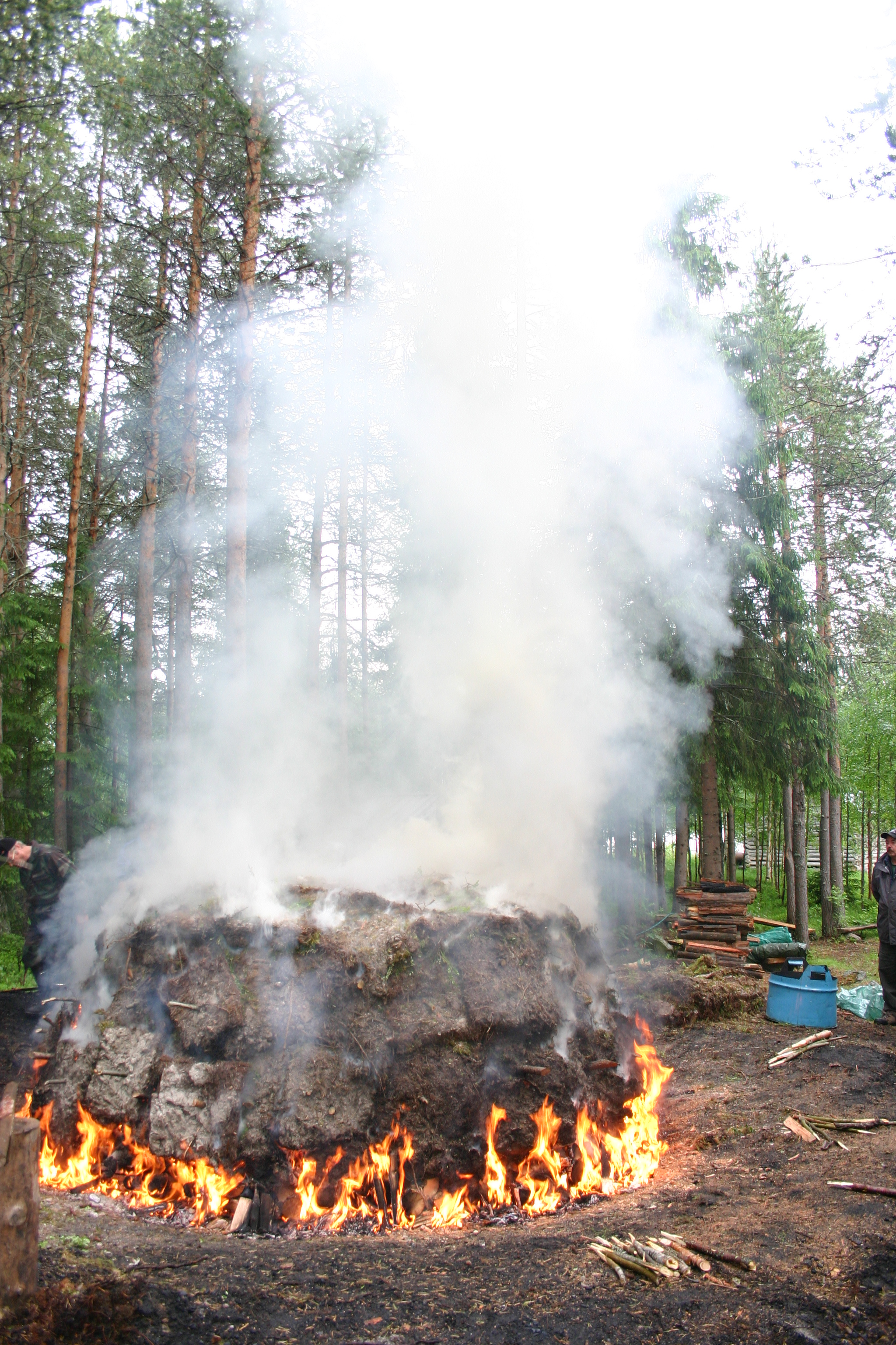 Tervanpolttonäytös on osa Sirniön seppäpäivien jokavuotista ohjelmaa